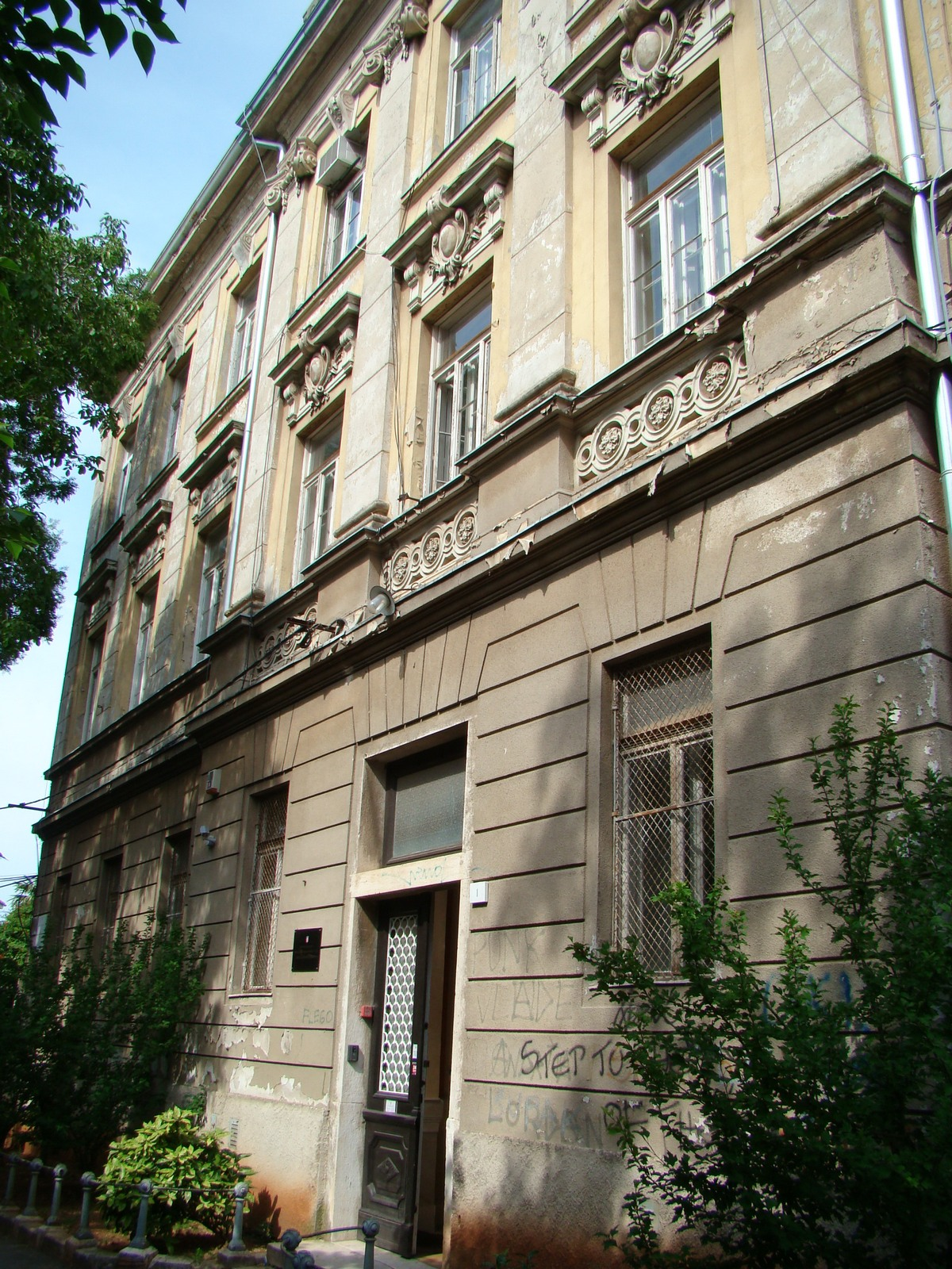 Zgrada Sveučilišne knjižnice u Puli